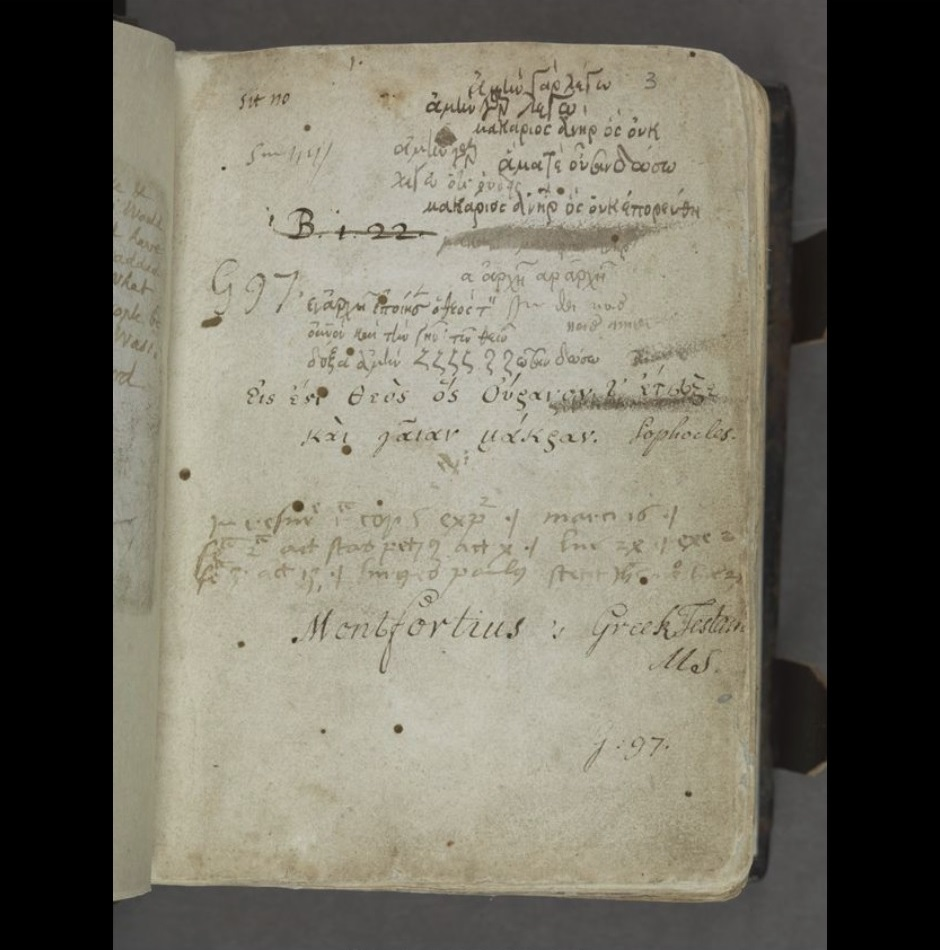 Cod. Montfortianus page 3 recto 1